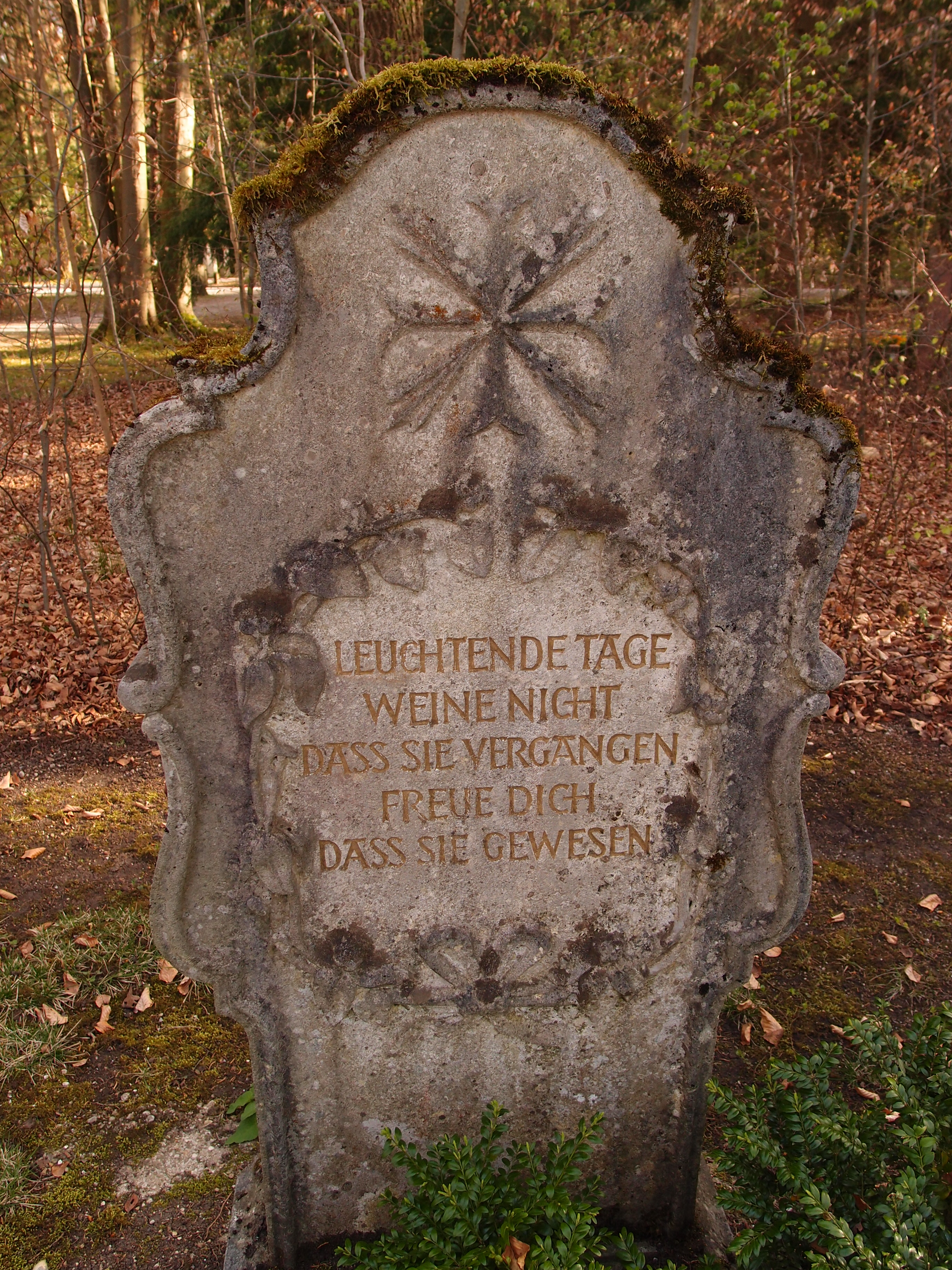 Alter Grabstein, München, Waldfriedhof, Alter Teil